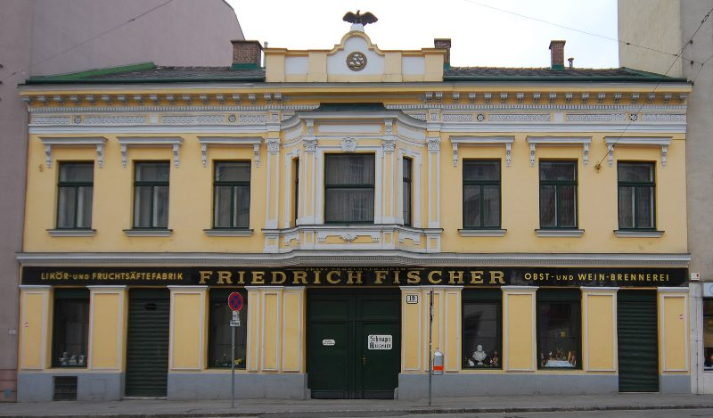 Schnapsmuseum in Wien-Meidling, Wilhelmstraße 19